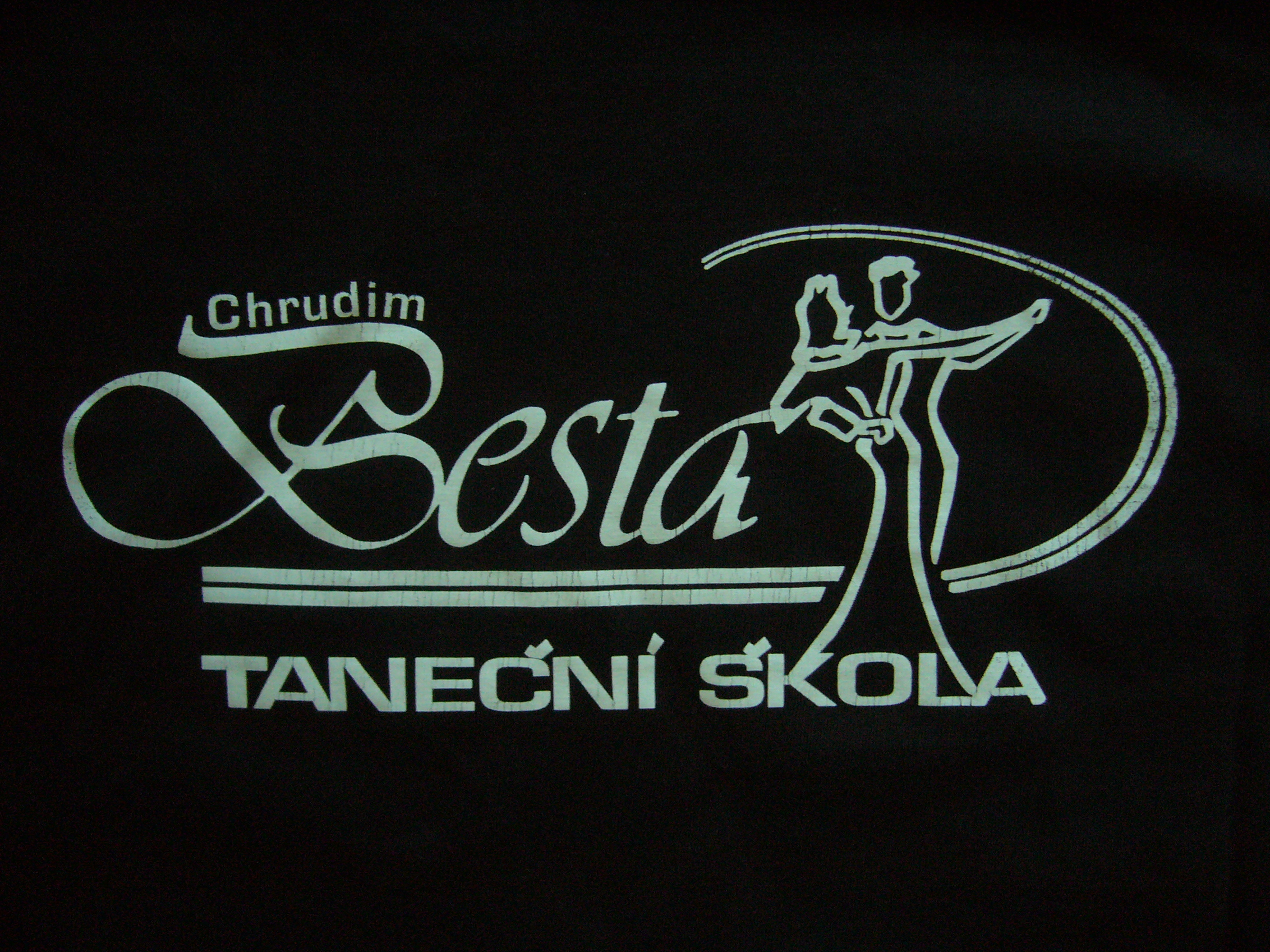 Logo taneční školy Besta